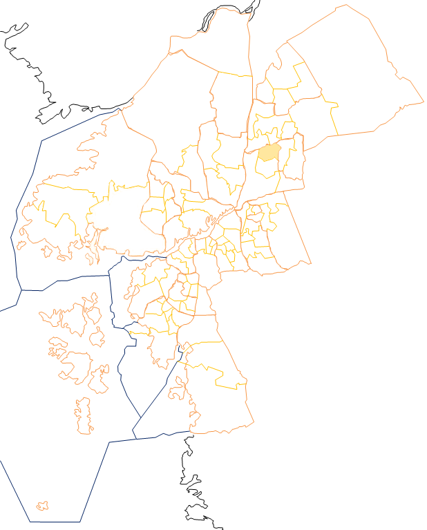 Karta som visar primärområdes belägenhet i Göteborg